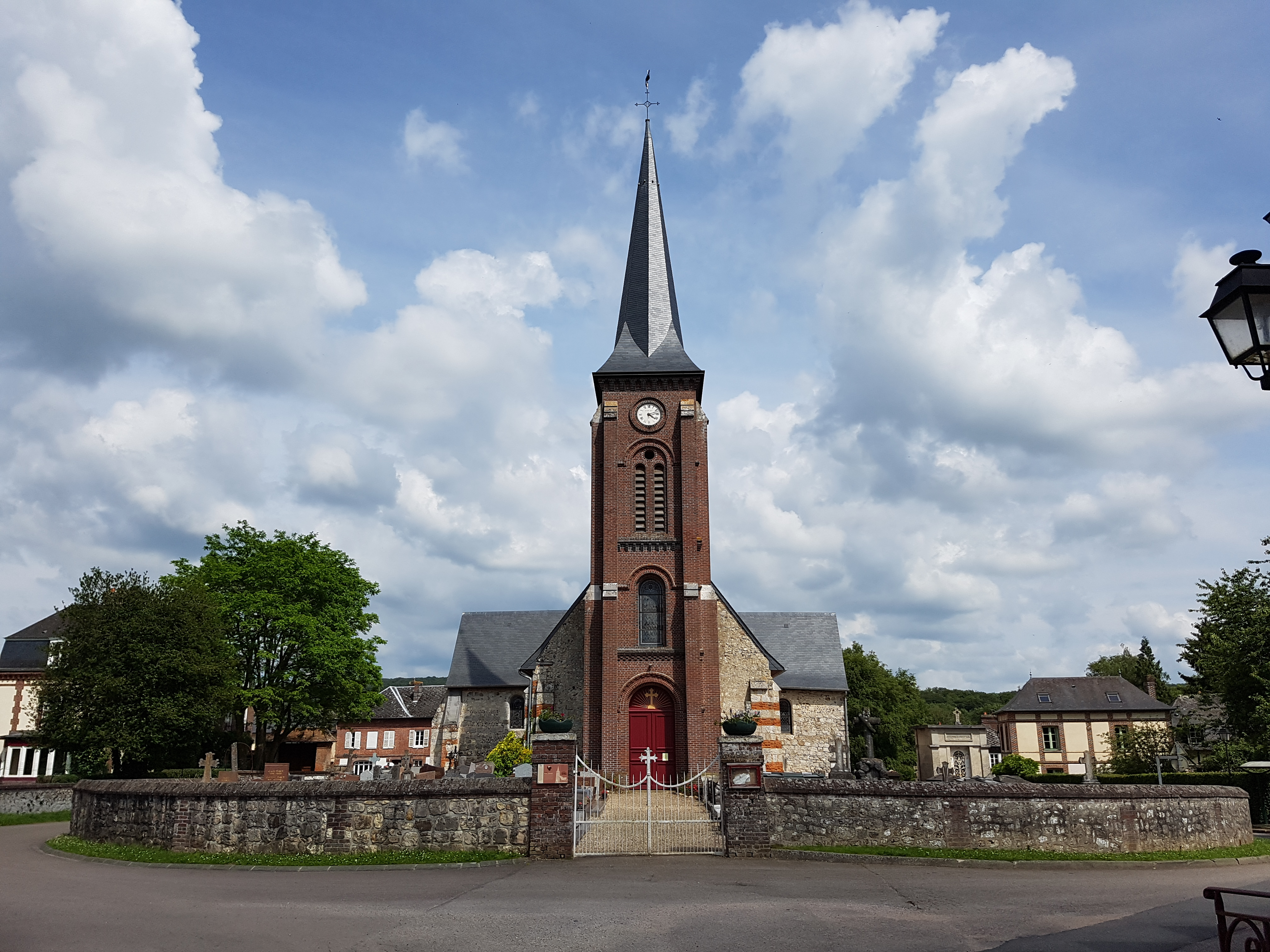 Eglise Saint-Martial de Vascoeuil